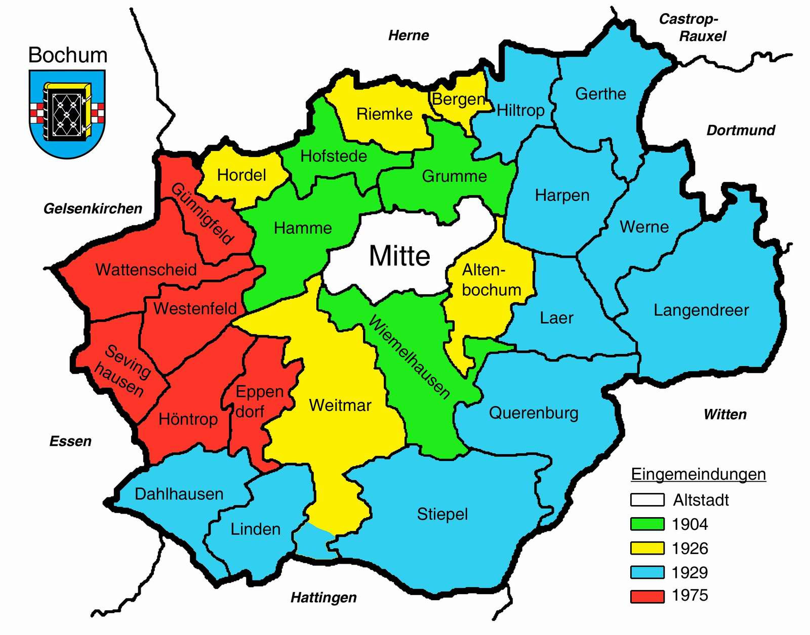 Karte von Bochum mit den Stadtteilen von Bochum mit einer grafischen Darstellung der Eingemeindungen A map of Bochum / Germany with the amalgamation, of other towns Date: 2007, Bochum, Germany by using and historic books & Author: Maschinenjunge Licence: see below.